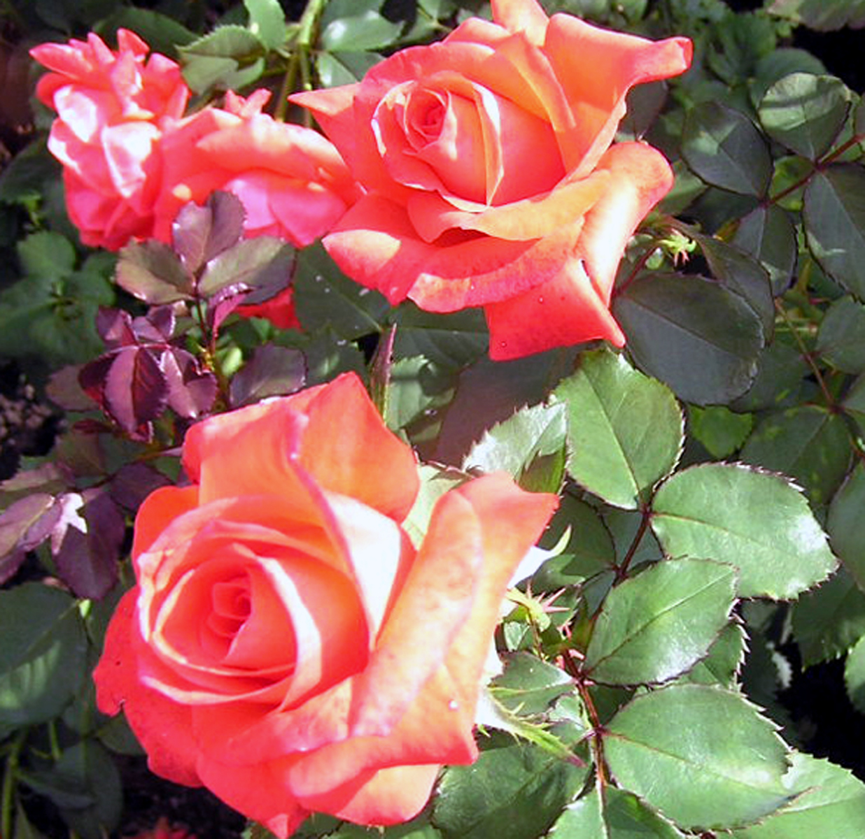 Description: Rose 'Späths Jubiläum' (Kordes 1970) Source: Eigene Fotografie Date: 25. Juli 2005 Author: Schubbay